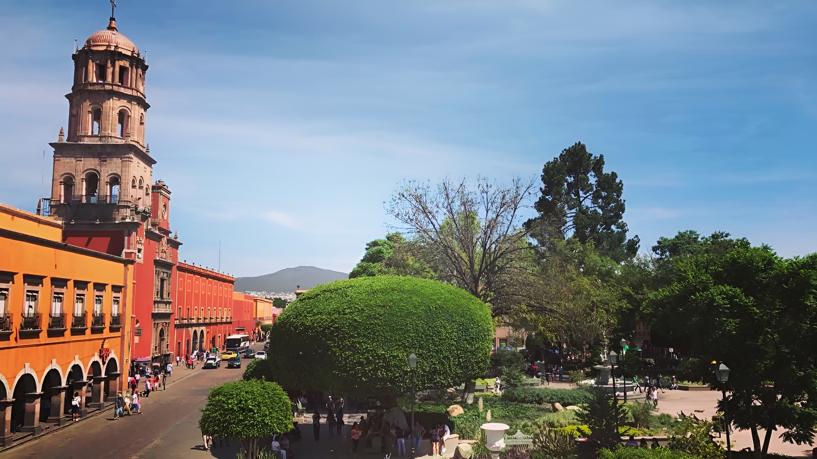 Centro histórico de Santiago de Querétaro